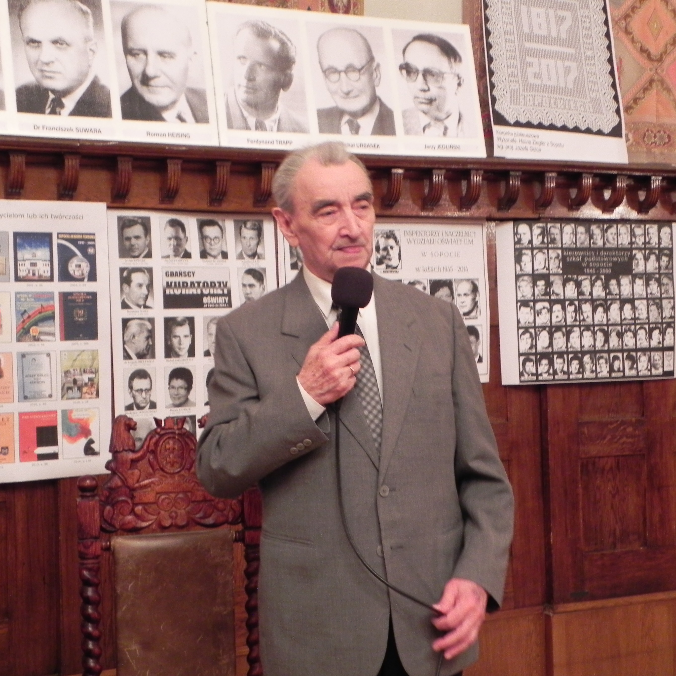 Józef Golec, pedagog, działacz społeczny, instruktor harcerski, esperantysta.